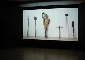 שחרית 2011. מראה_הצבה, צילום, וידיאו - עמית יסעור, רקדנית אדוה קידר.